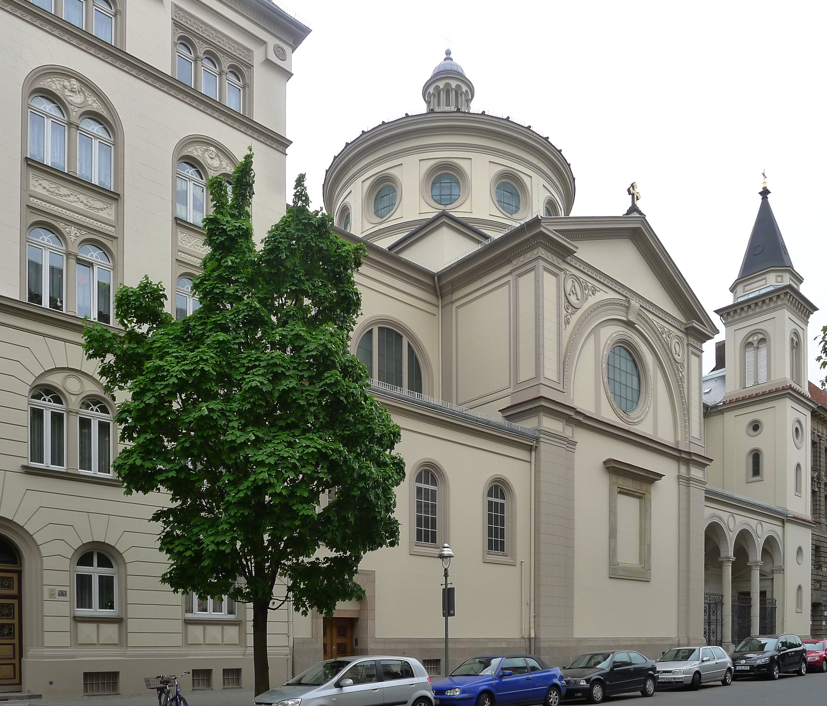 Gesamtansicht der Kirche